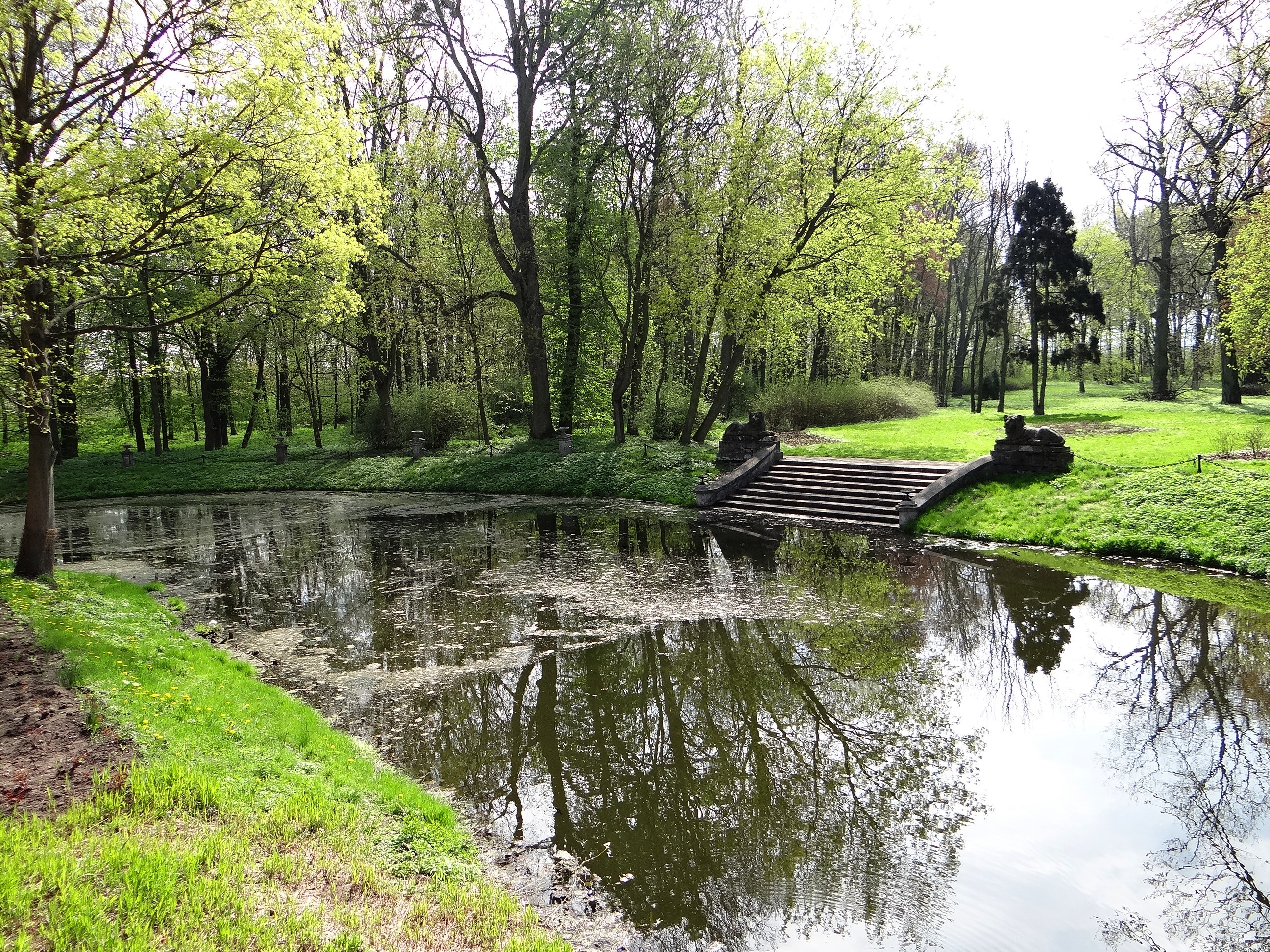 Oporów, park, 1 poł. XVIII, 1 poł. XIX